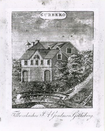 Gradmans Tobaksspinneri och Snusfabrik. Trade mark